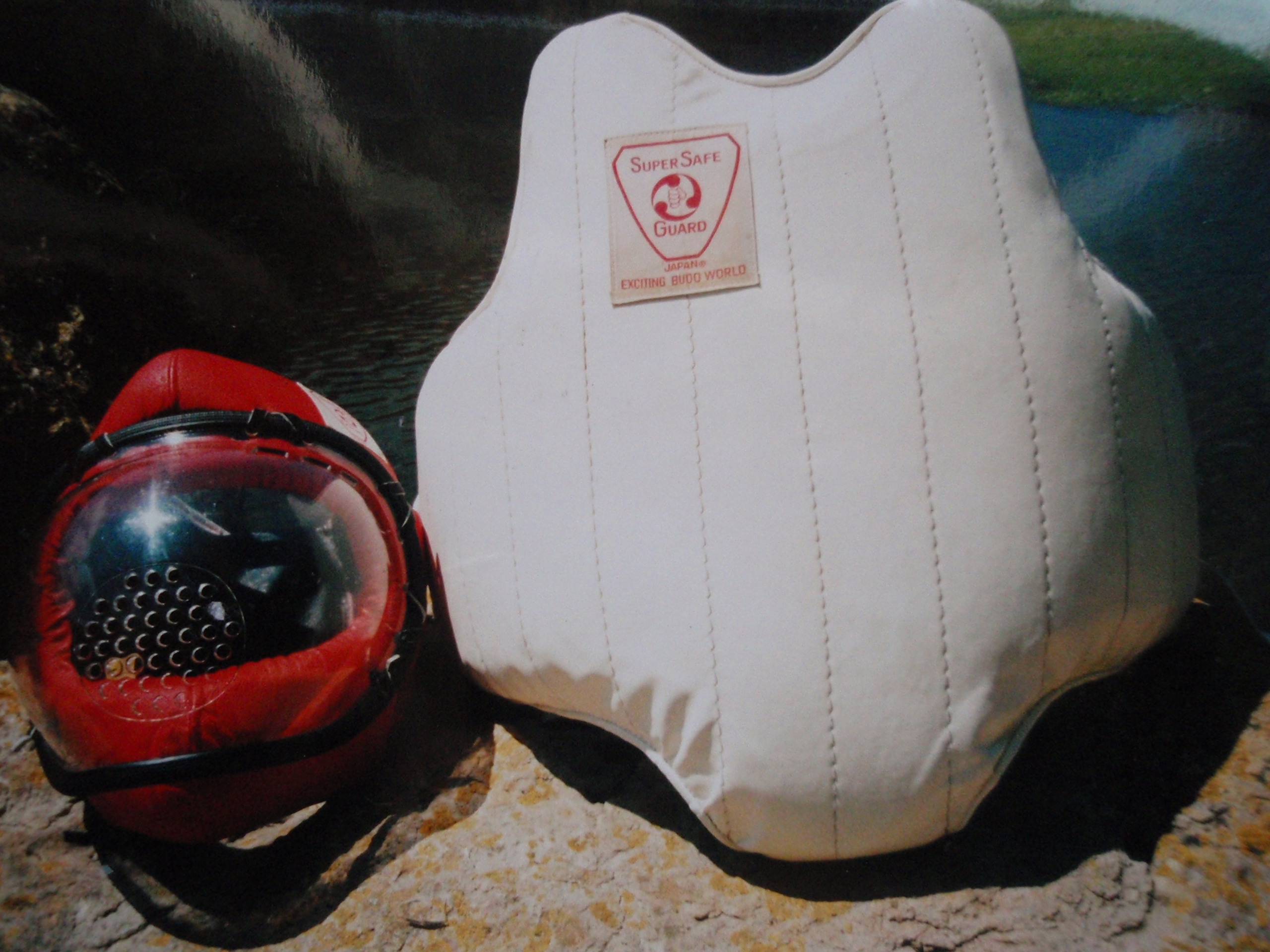 Equipos de Seguridad para Koshiki Karate